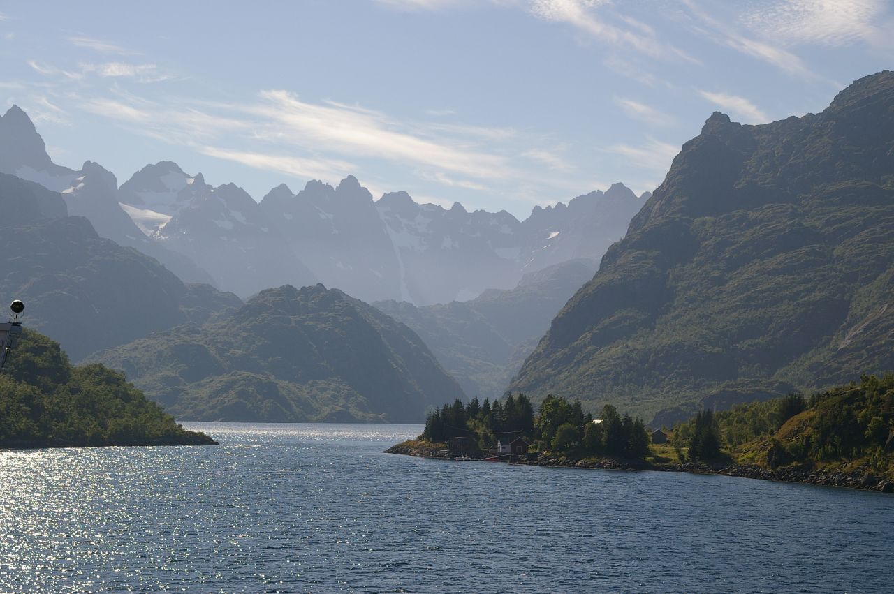 19 Troll fjord 01 entrance 3